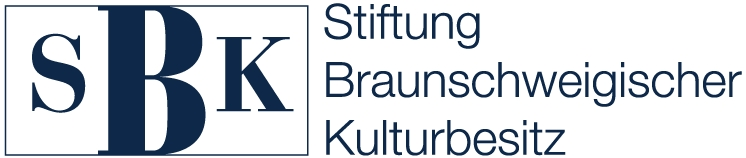 Logo der Stiftung Braunschweigischer Kulturbesitz